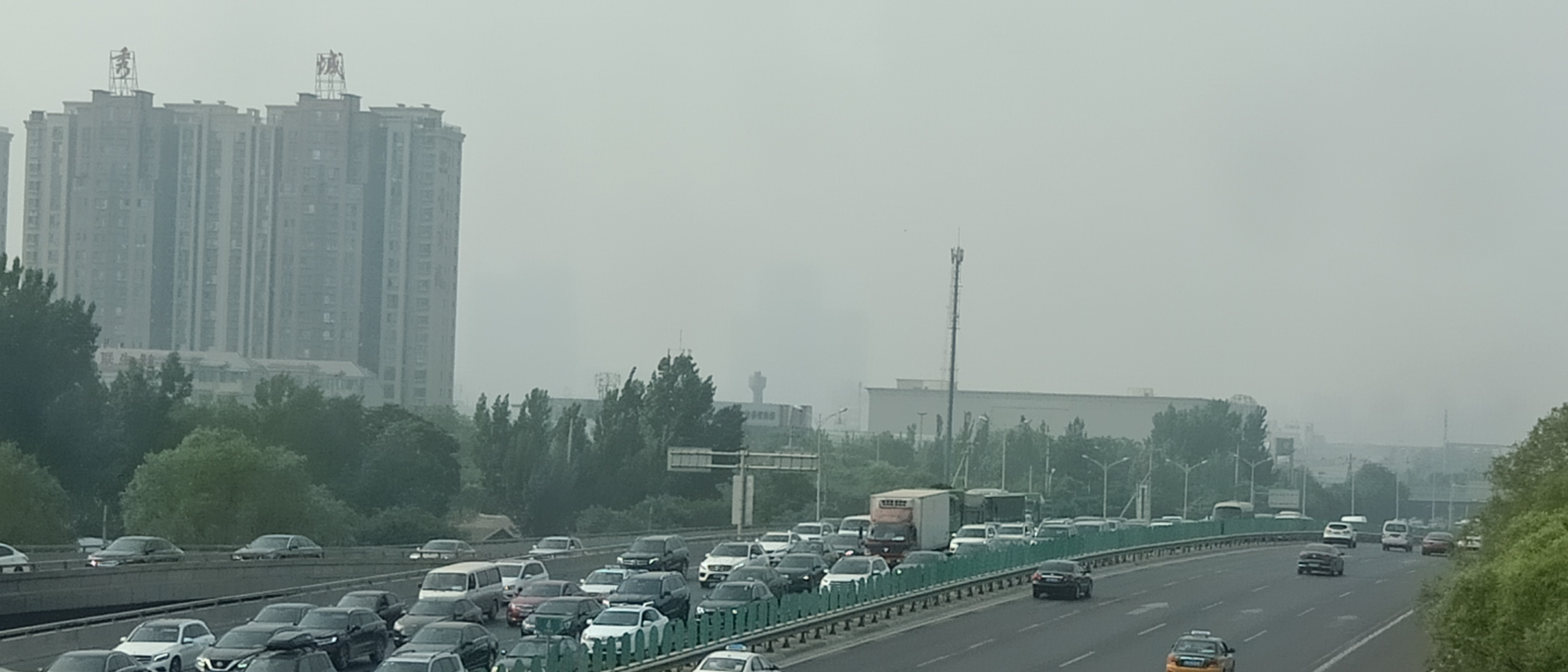 粵語: 106國道嘅K7+920標記位（北京大興區西紅門南橋嗰邊）